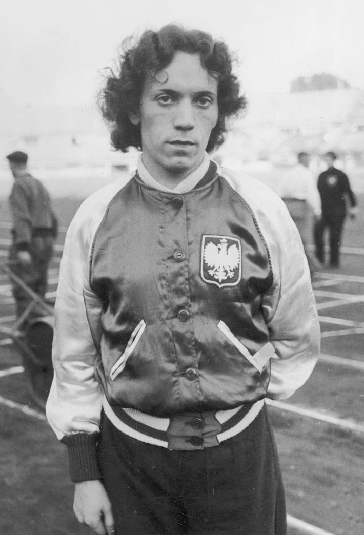 Stanisława Walasiewicz w trakcie II Mistrzostw Europy w Lekkoatletyce (dla kobiet) w Wiedniu w 1938 roku